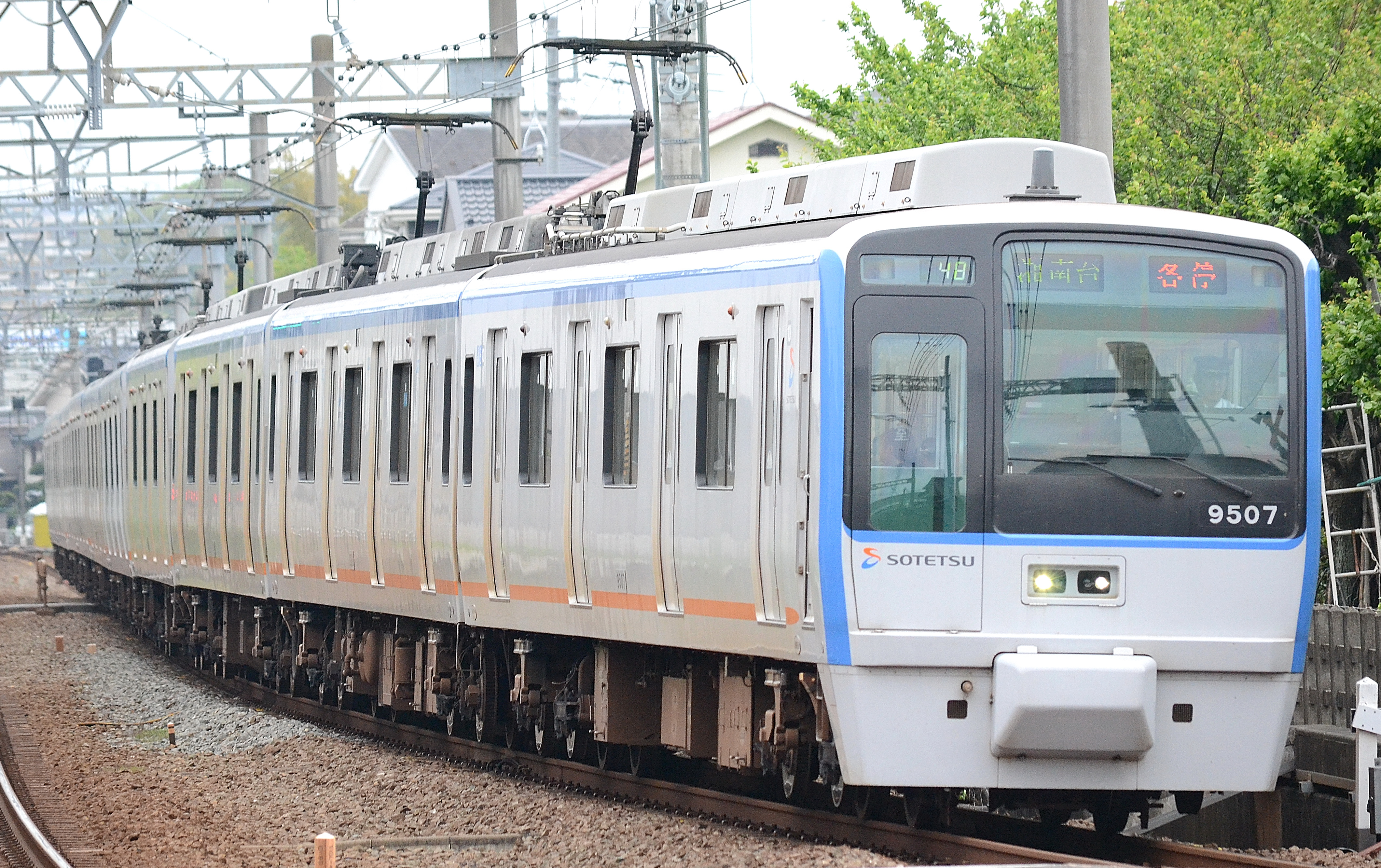 相模鉄道9000系（鶴ヶ峰-二俣川間）